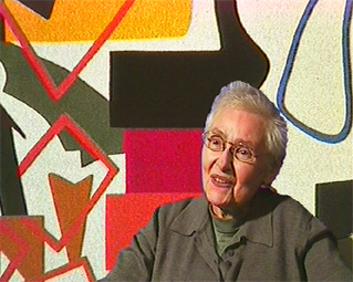 Portrait de Shirley Jaffe